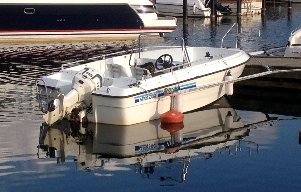 Ryds 530 GT Styrpulpetbåt